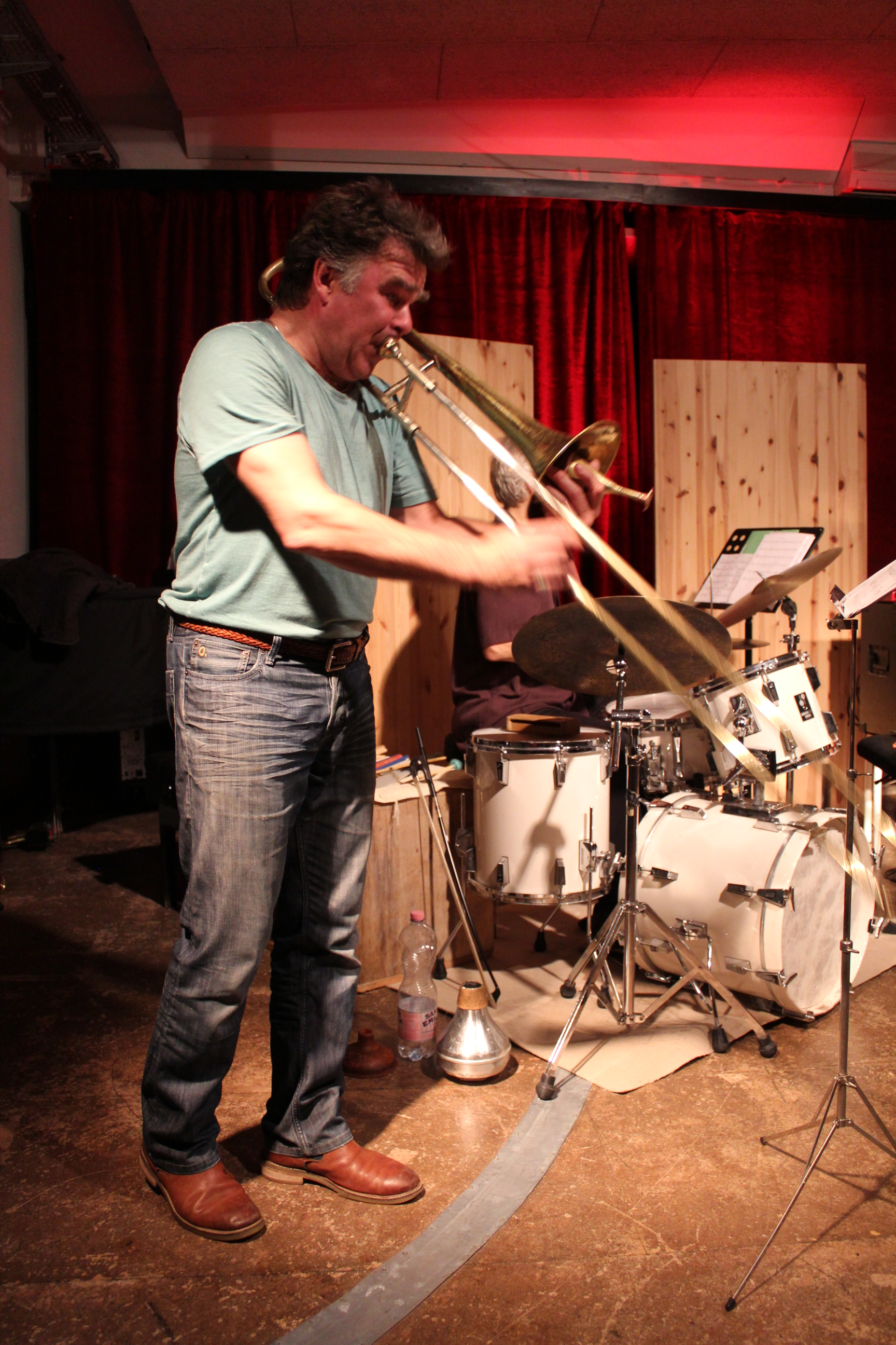 Wolter Wierbos (im Hintergrund: Gerry Hemingway) mit dem Frank Gratkowski Quarett im Kölner Loft, Oktober 2013